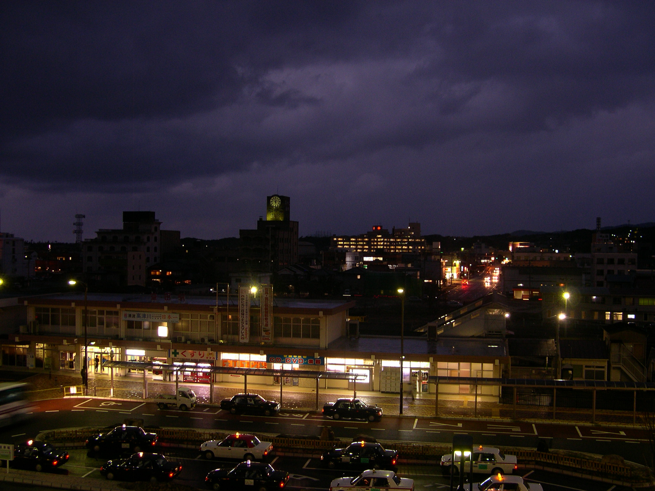 益田駅